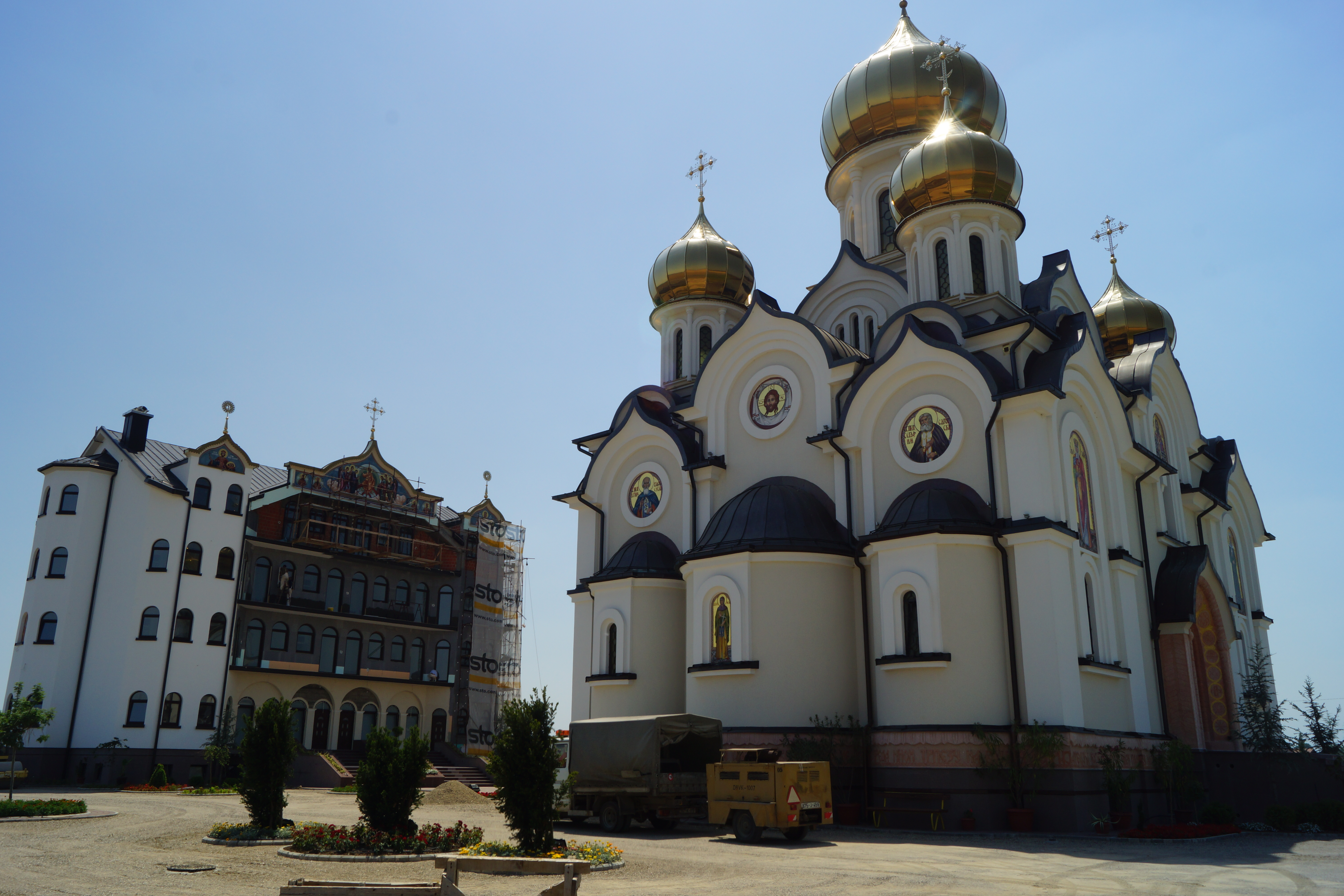 Manastir Svete Petke-Bijeljina